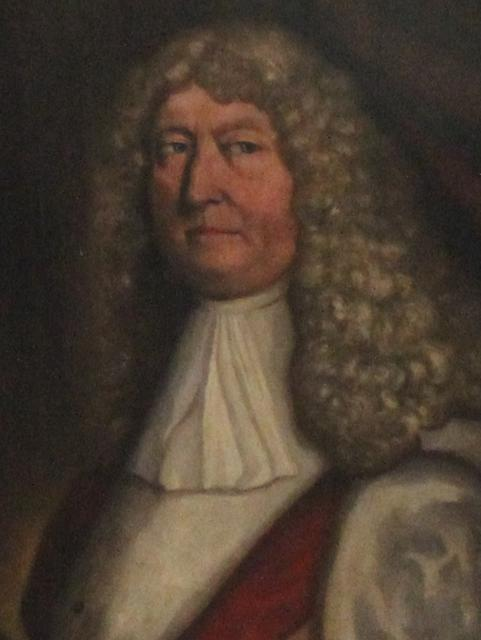 Ernest Bogusław de Croÿ, portrait @Kamień Pomorski cathedral pipe organs, Poland